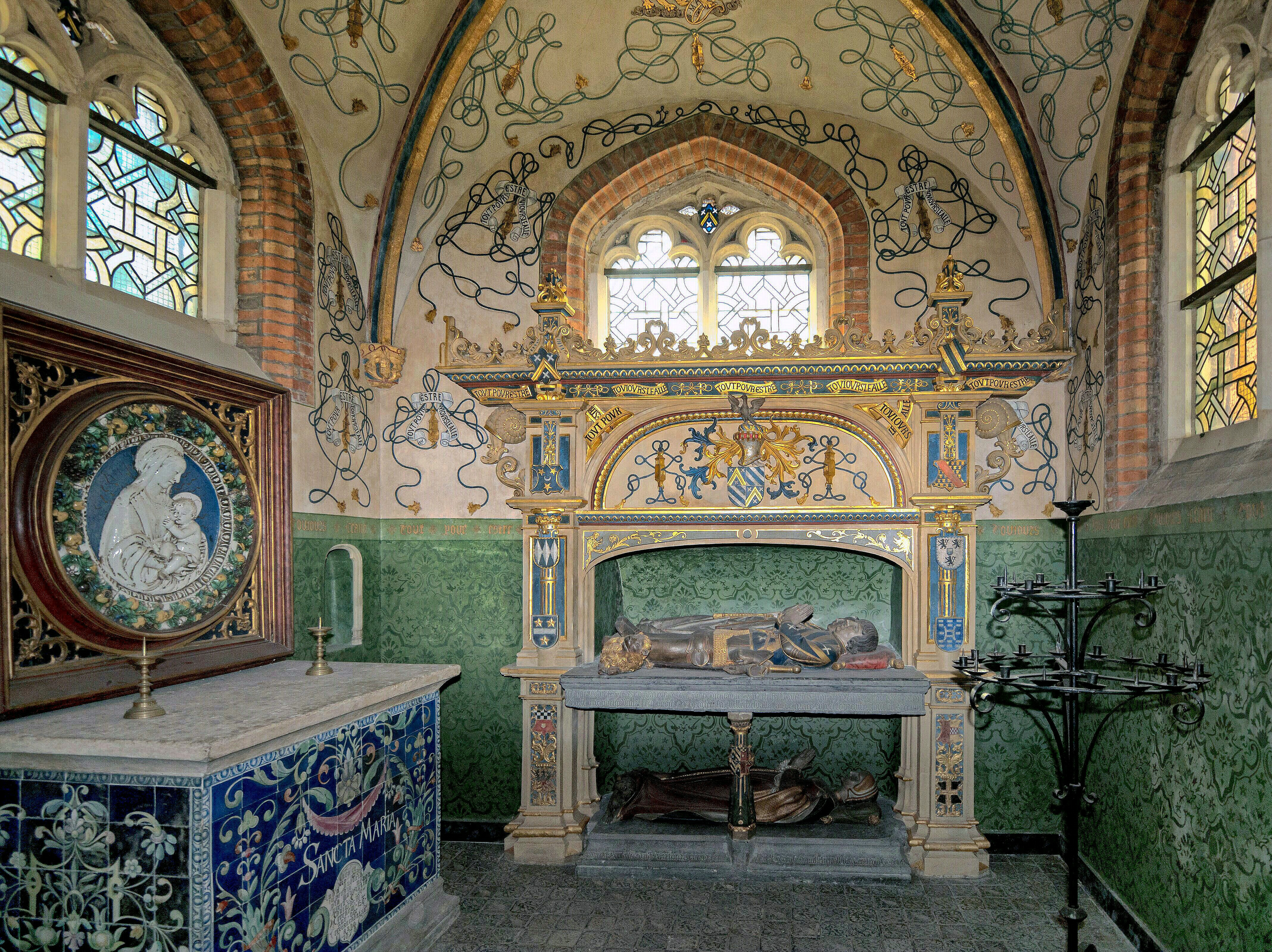 Die Grabkapelle der Familie de Gros in einer Seitenkapelle der Jakobuskapelle entstand in den 20er Jahren des 16. Jahrhunderts. Der Bürgermeister Ferry de Gros († 1547), dargestellt als Ritter mit Schwert und Kampfhandschuhen, liegt neben seiner ersten Ehefrau Philippine Wielant († 1521); unten die zweite Ehefrau Françoise d´Ailly († 1530). Auf dem Altar mit glasierten Kacheln eine Terrakotta-Madonna der Familie della Robbia aus Florenz.